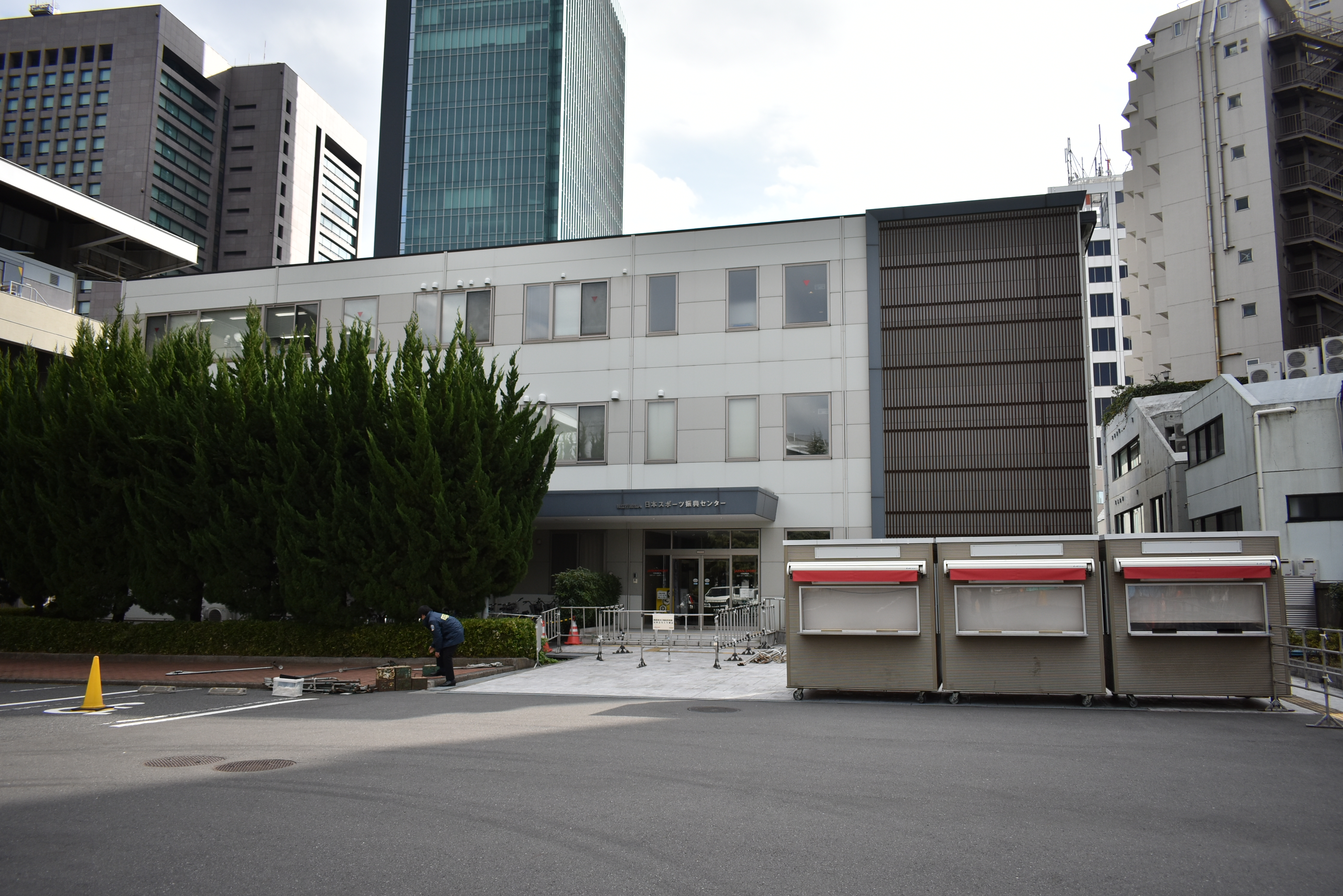 日本スポーツ振興センター